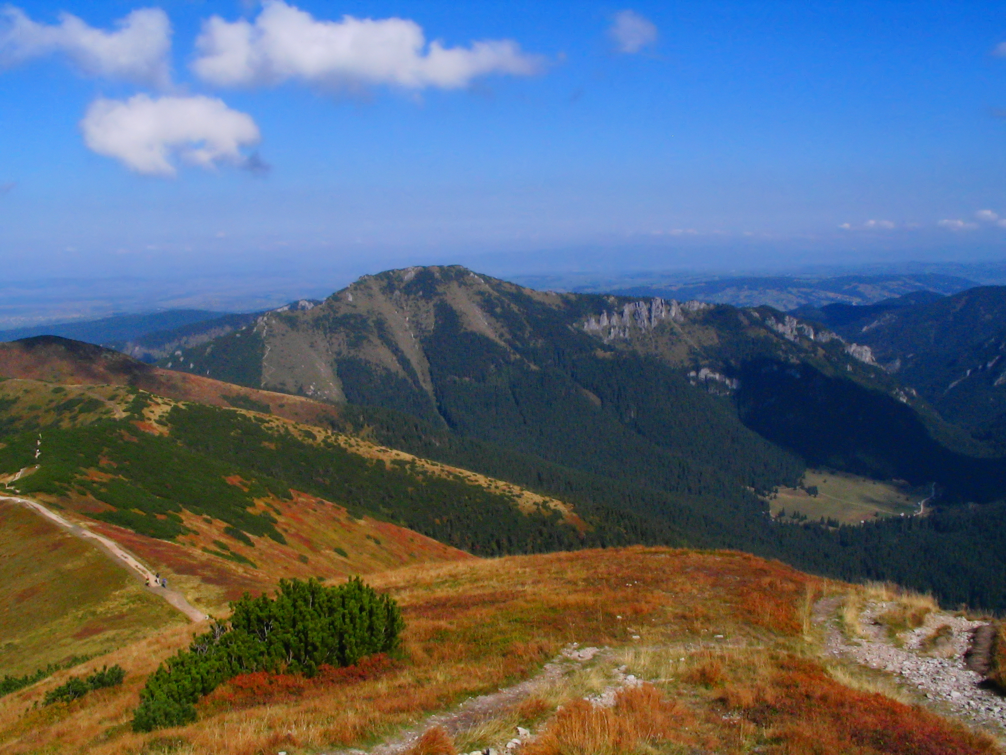 Grześ-Rakoń-Wołowiec 5